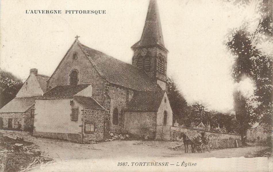 L'église